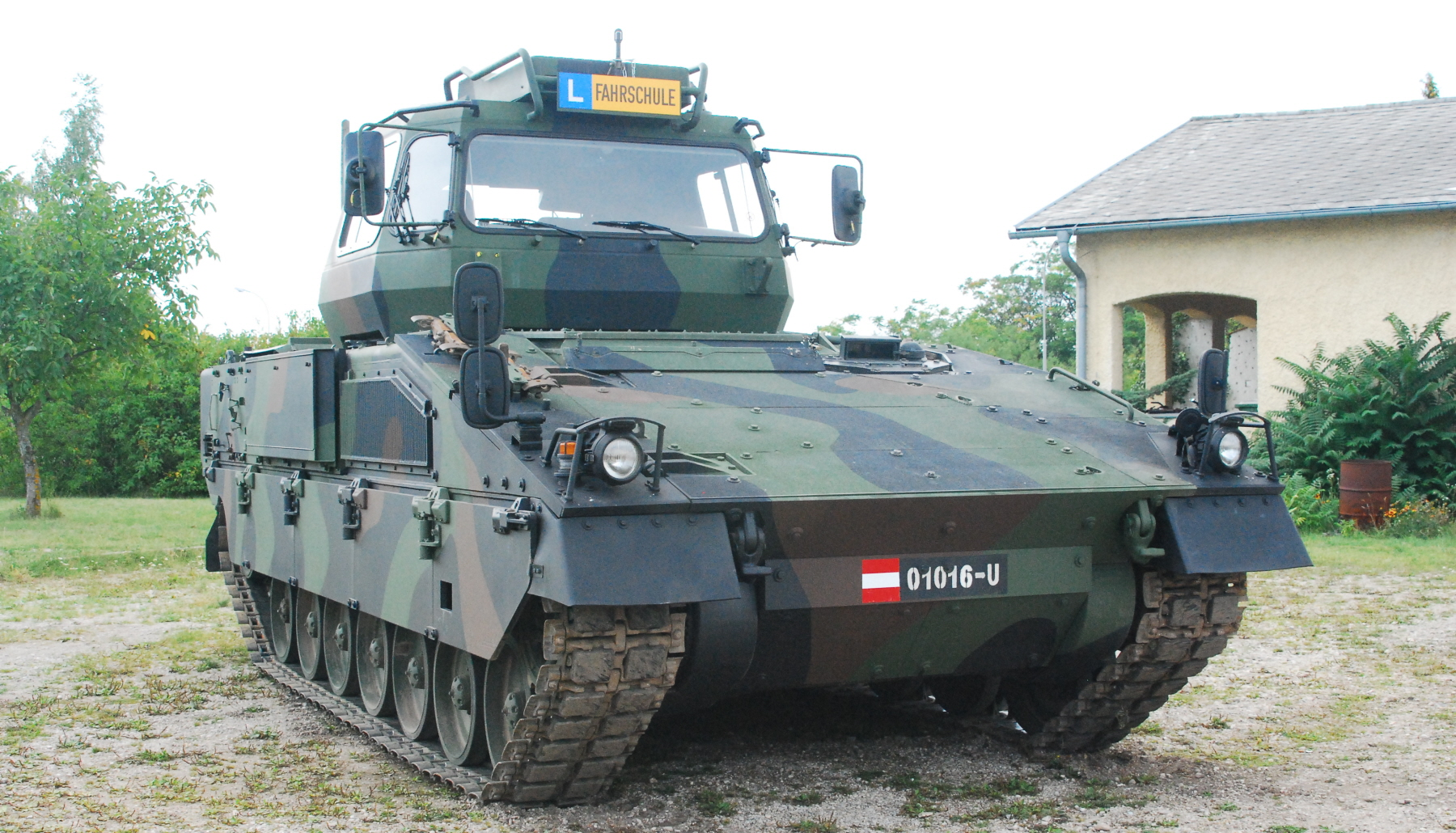 Fahrschulausführung des ASCOD-Schützenpanzers